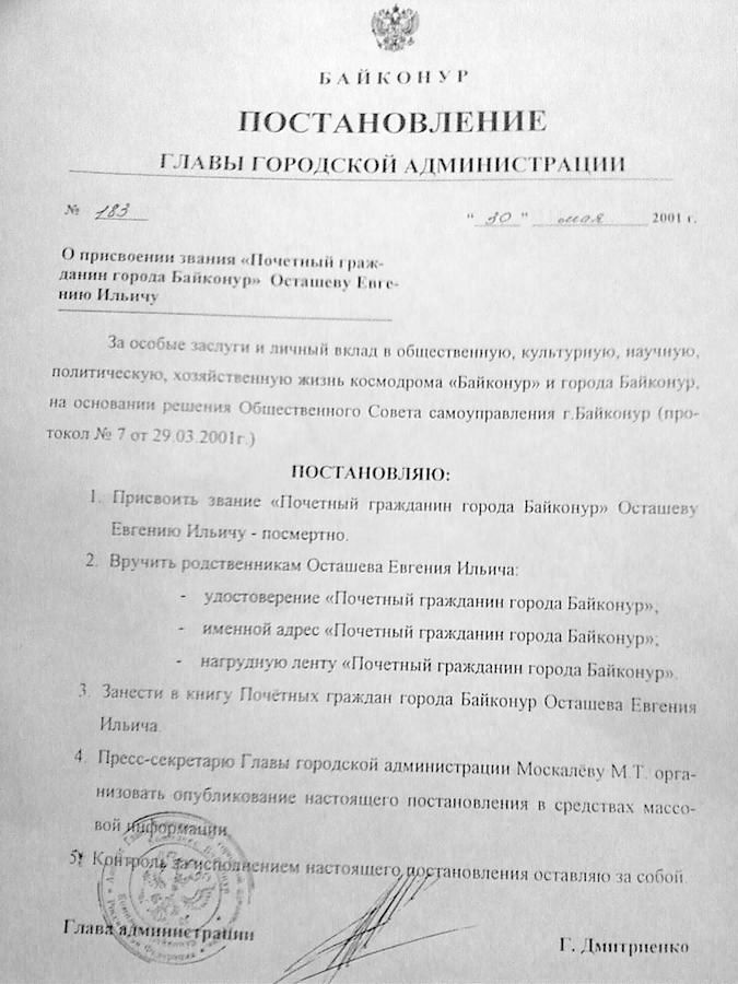 Постановление главы городской администрации о присвоении звания "Почётный гражданин города Байконур"